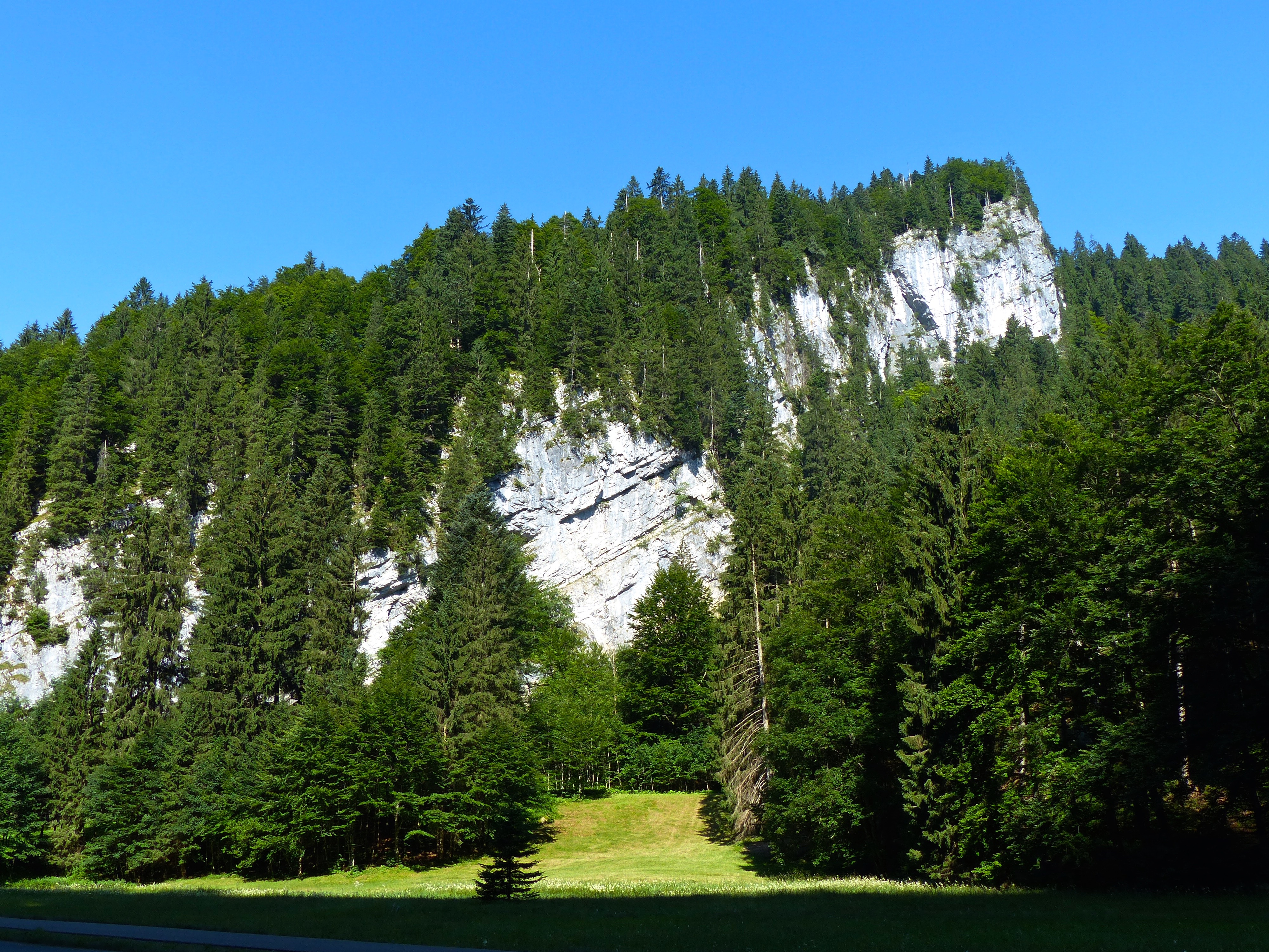 WikiProjekt Landstreicher Aufschluss an der Lochbachstrasse: Schrattenkalk